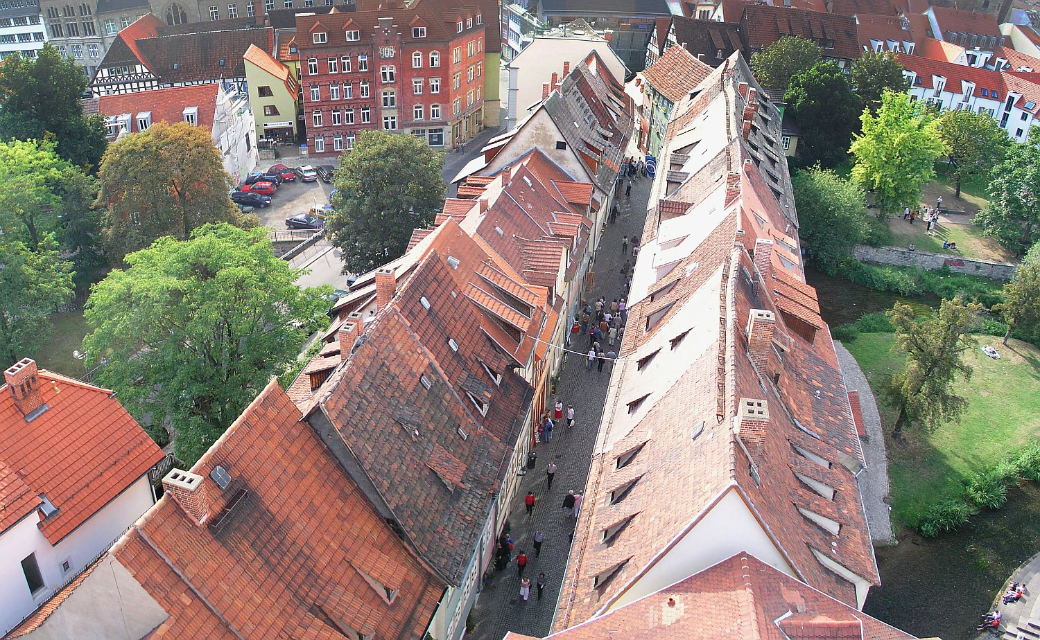 Erfurter Krämerbrücke vom Turm der Ägidienkirche